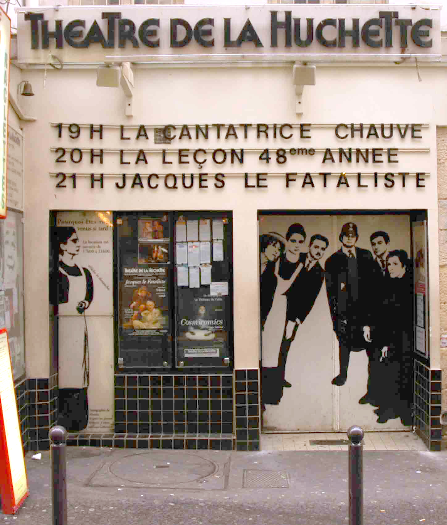 photo du théatre de la Huchette prise le 05 mars 2006